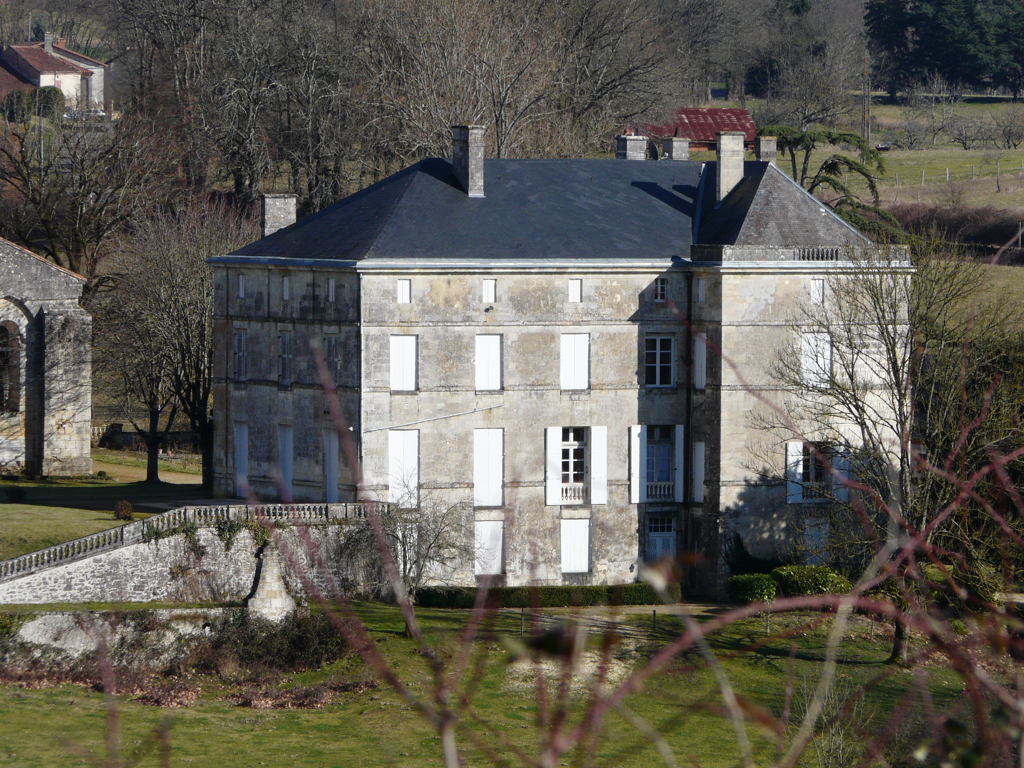 Le château de Ligueux (en fait, il s'agit du logis de la prieure de l'ancienne abbaye), Dordogne, France